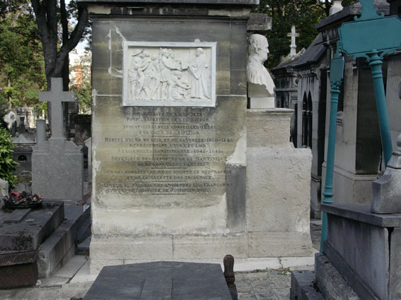 Sépulture de François Isambert au Cimetière de Montmartre à Paris.